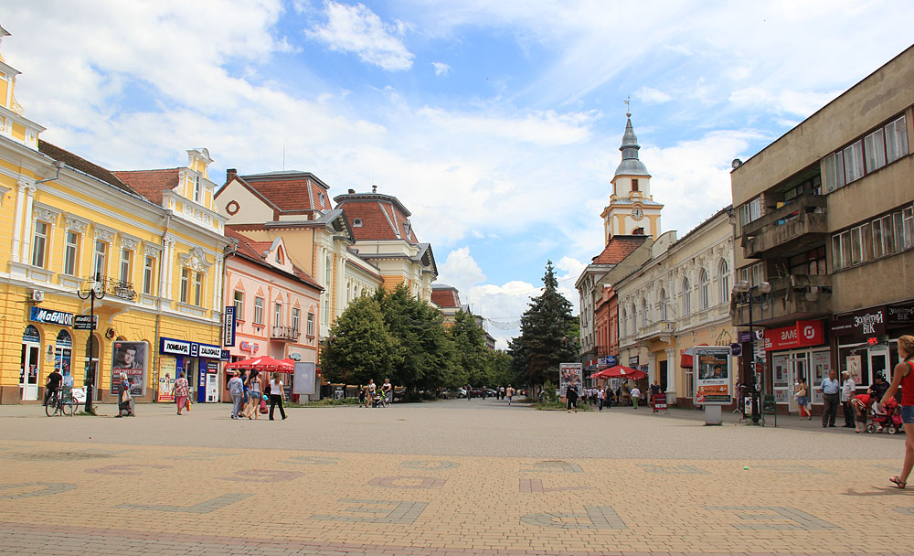 В центрі Берегово